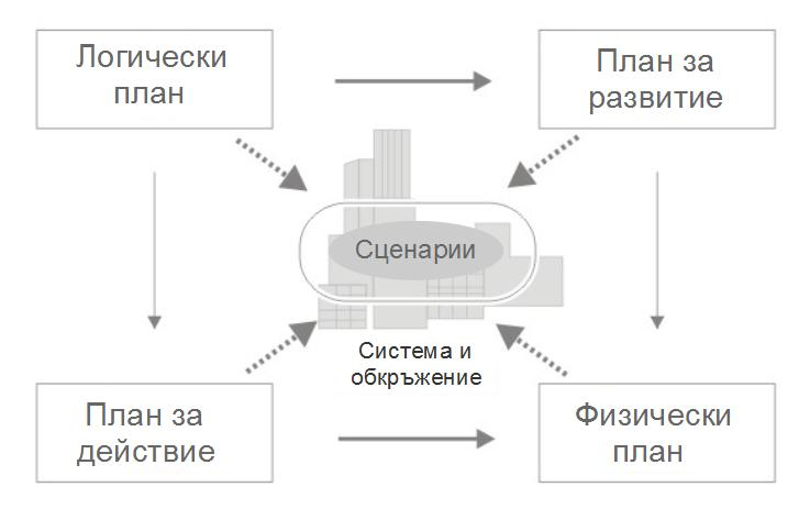 Обща илюстрация